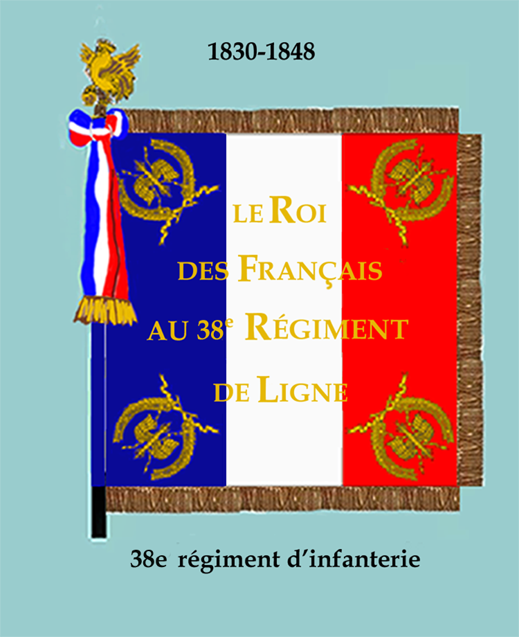 Drapeau du 38e régiment d'infanterie de 1830